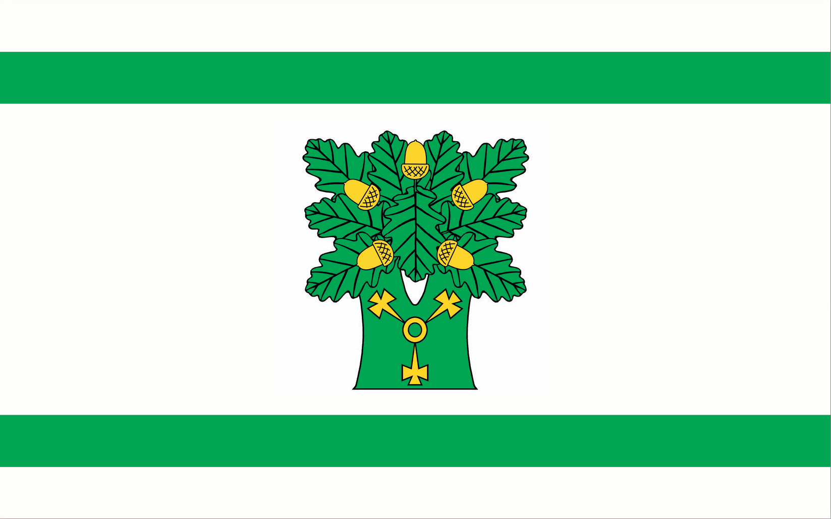 Flaga gminy Ojrzeń